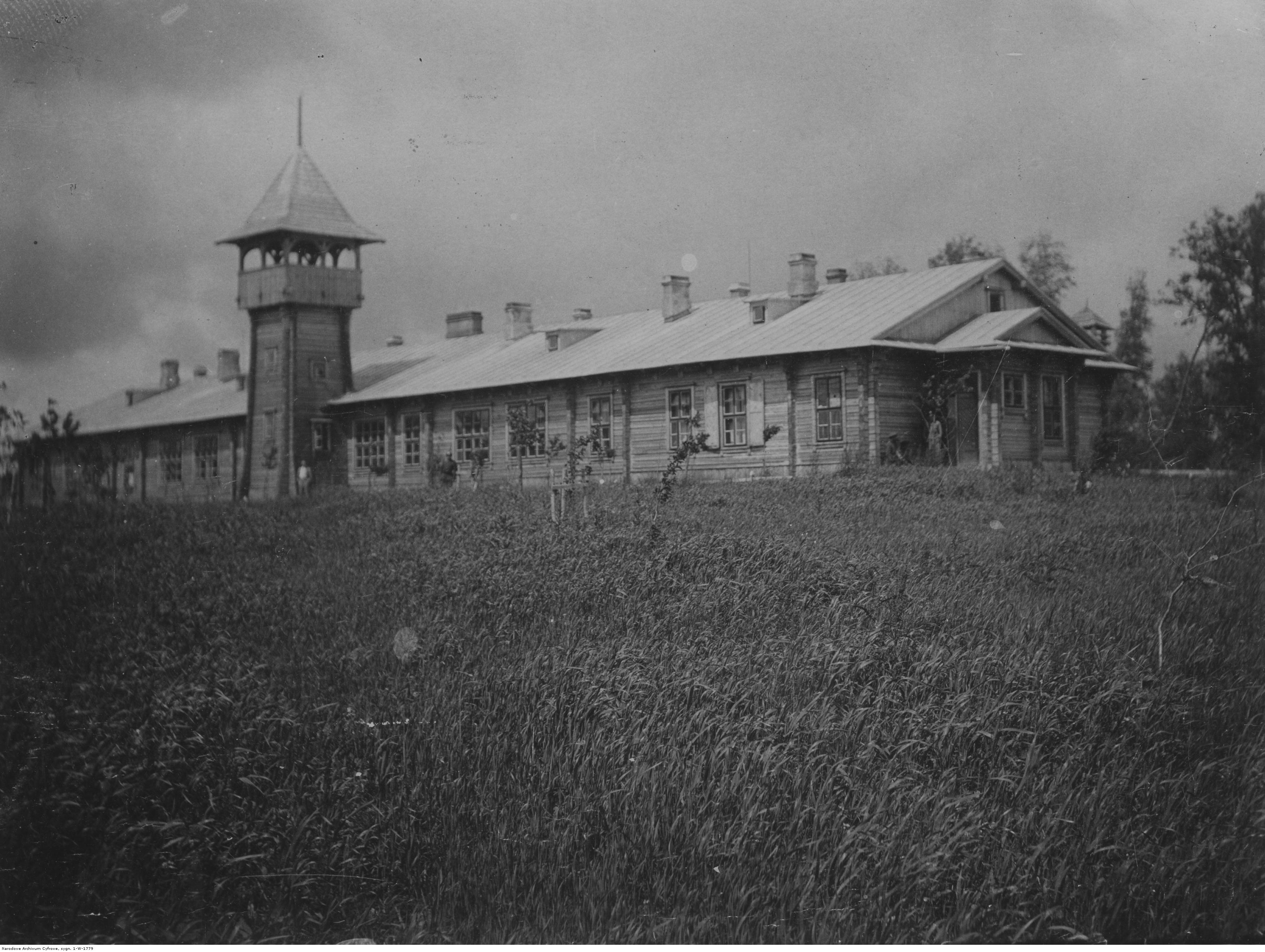 Koszary 7 Batalionu Korpusu Ochrony Pogranicza. Koncern Ilustrowany Kurier Codzienny - Archiwum Ilustracji. Sygnatura: 1-W-1779